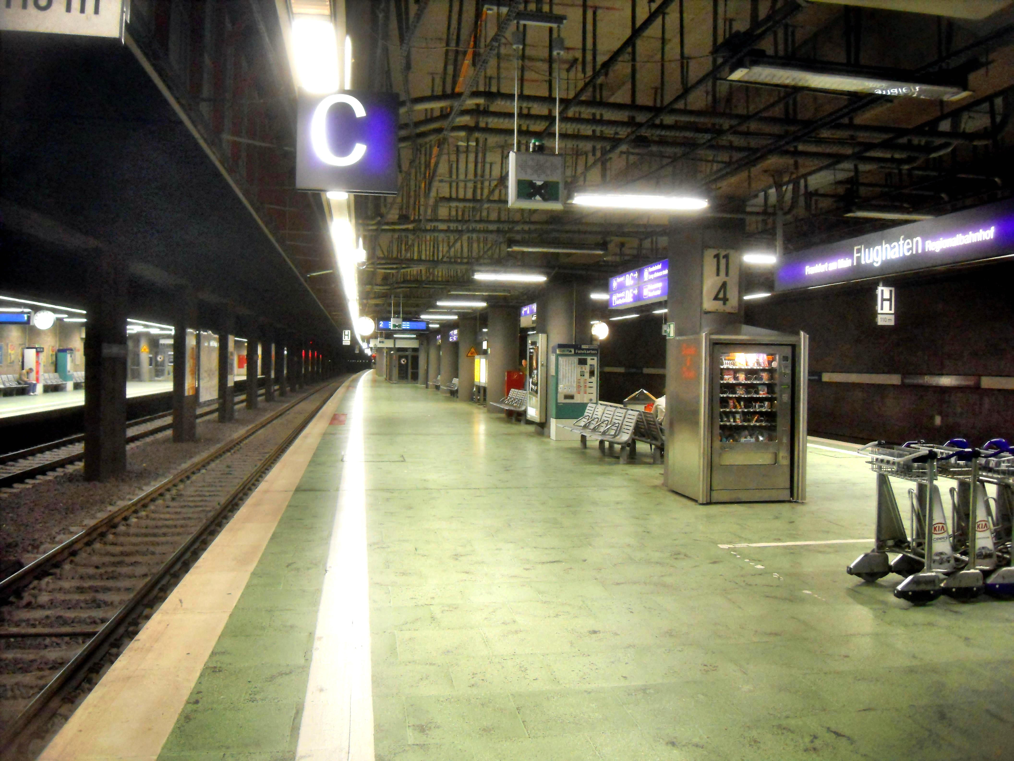 Der Regionalbahnhof des Frankfurter (Main) Flughafens in Hessen (Deutschland)